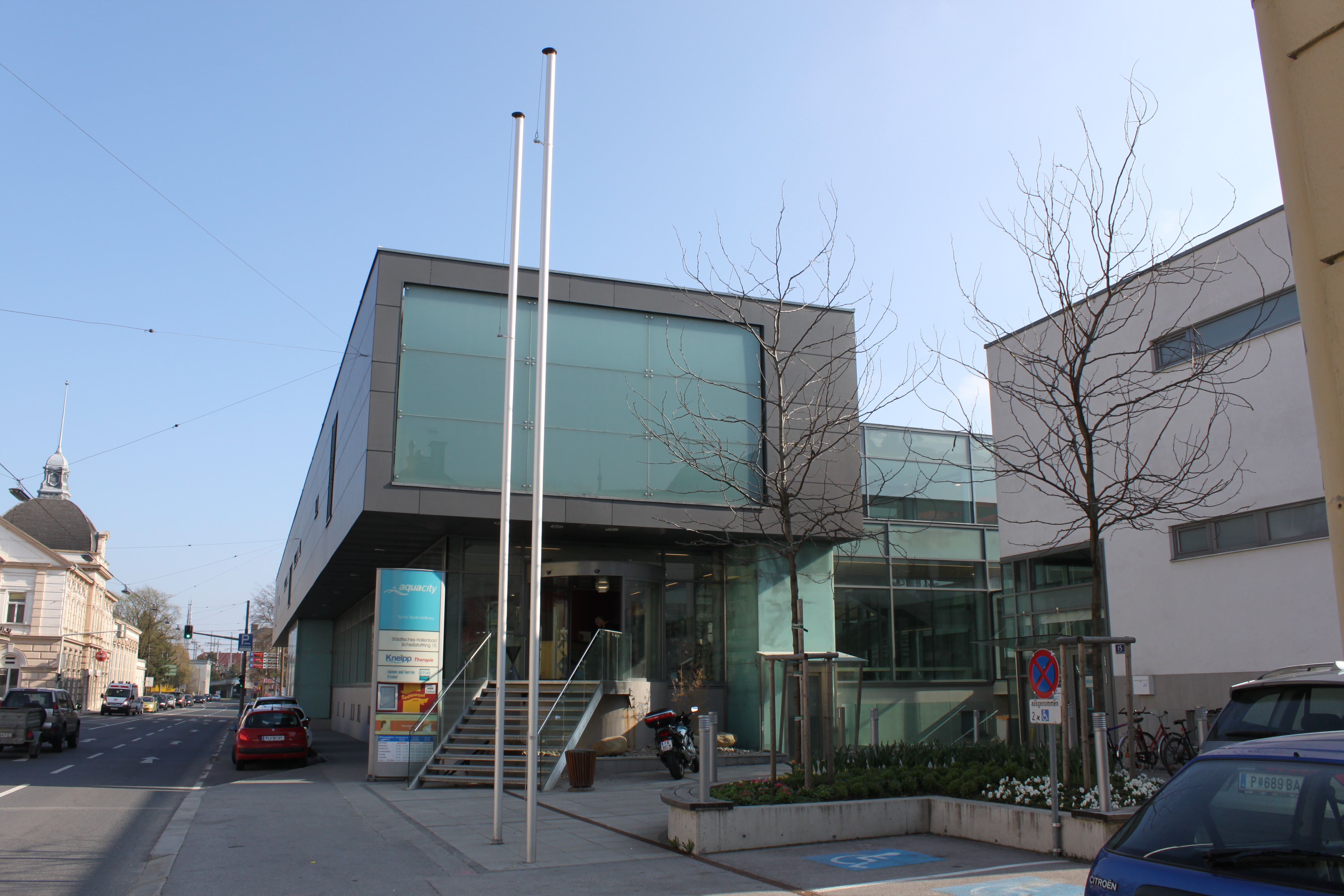 Aquacity, links Stadtsäle (St. Pölten)